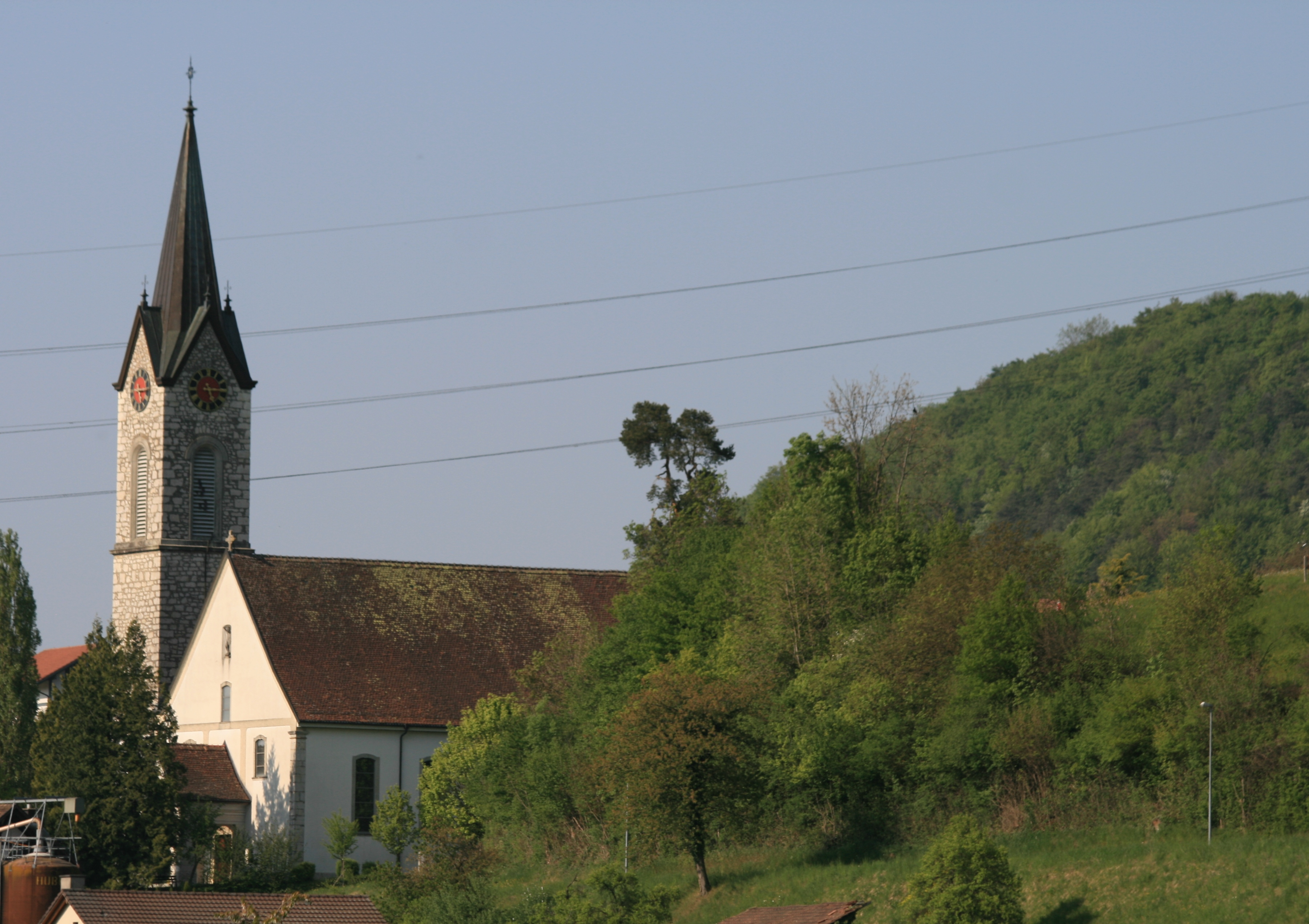 Kirche Unterendingen